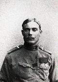 Hermogen Hints, üks Saaremaa mässu juhte